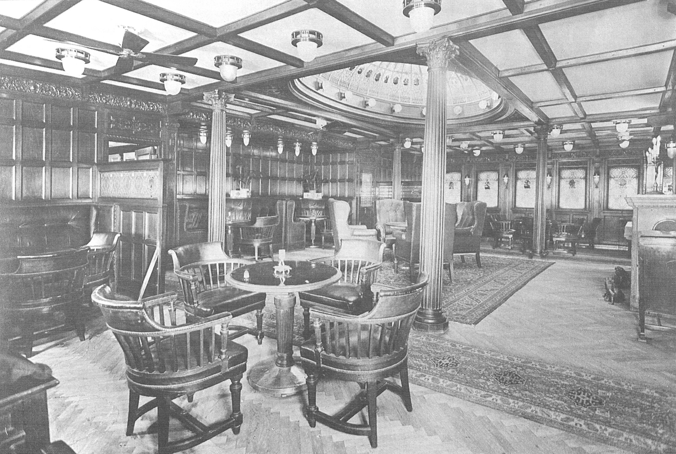 Der Rauchsalon für die 1. Klasse auf der "Kaiser Franz Joseph I." (12.567 t) der Austro-Americana